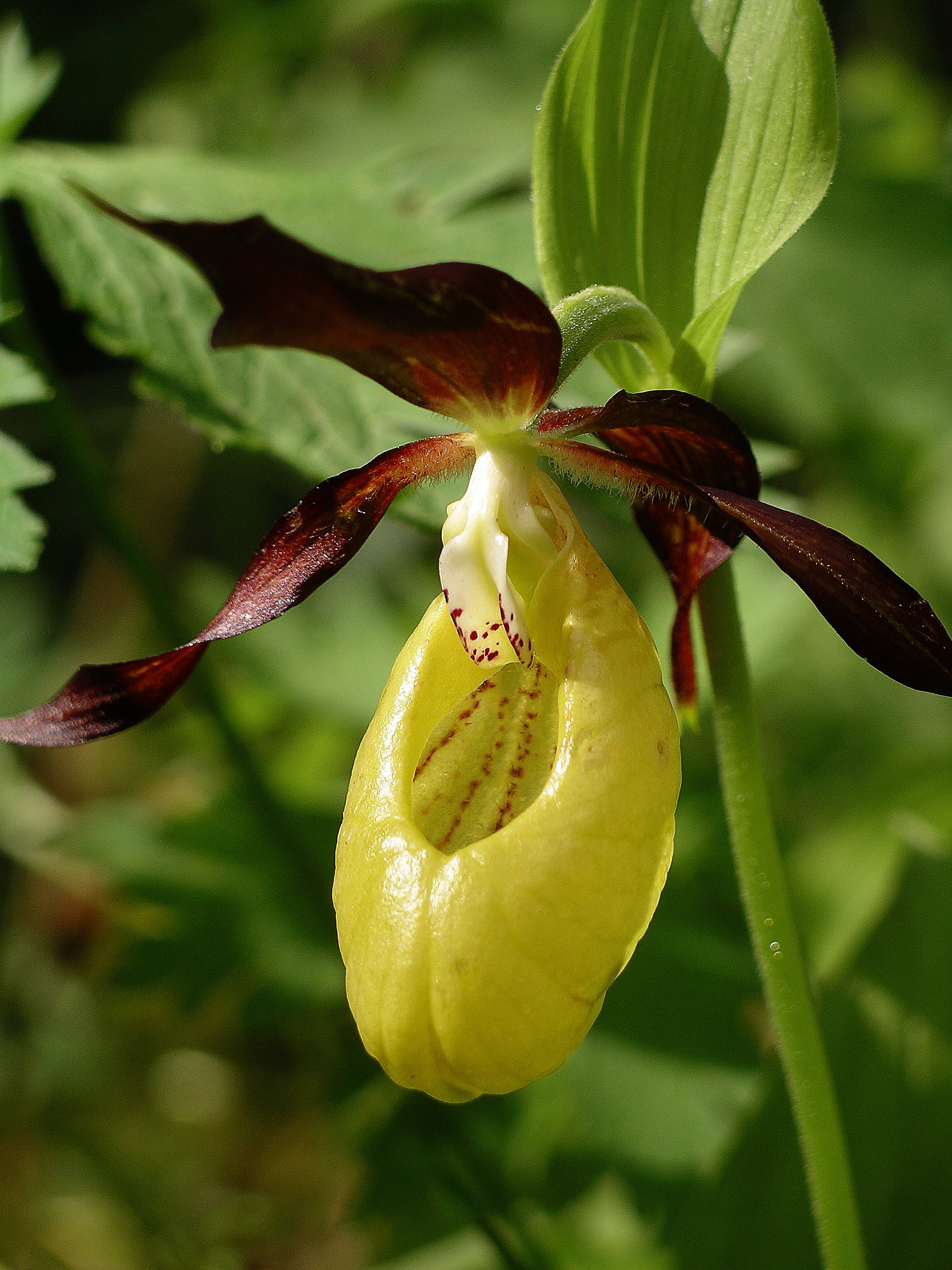 Guckusko, Jämtland juni 2004